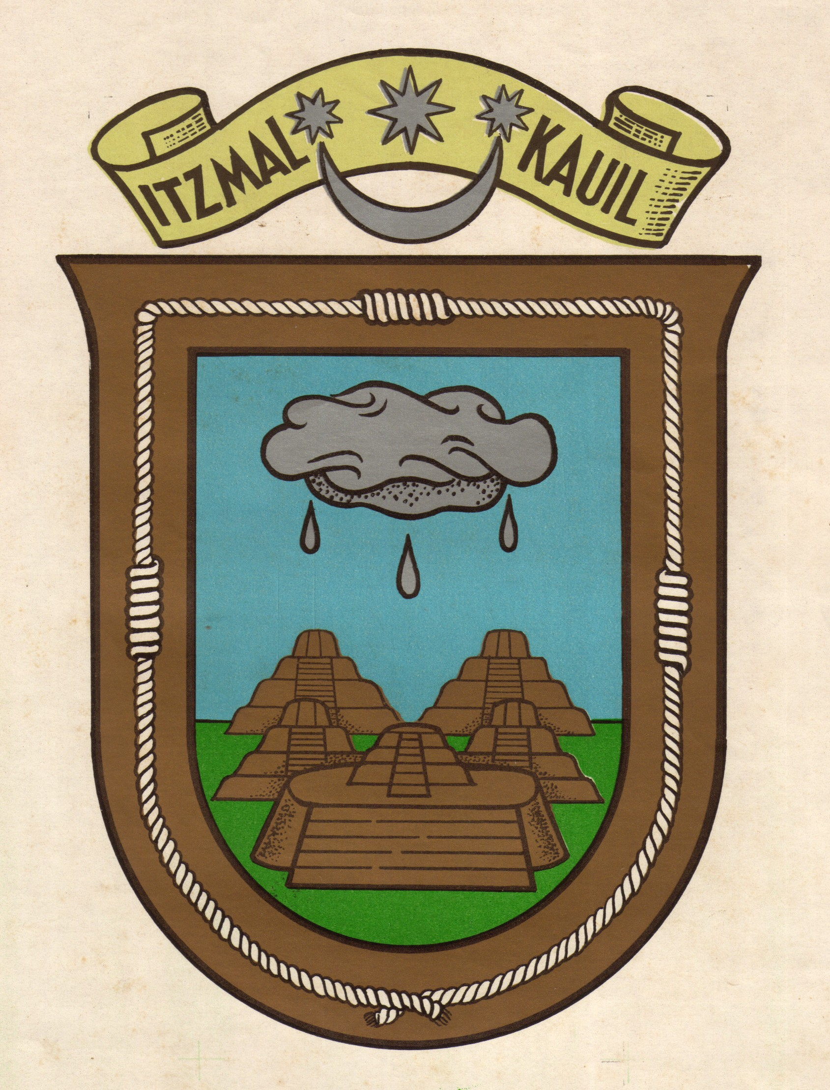 Escudo de Armas de la Ciudad de Izamal, Yucatán, México. Aprobado por el Cabildo el 11 de diciembre de 1977